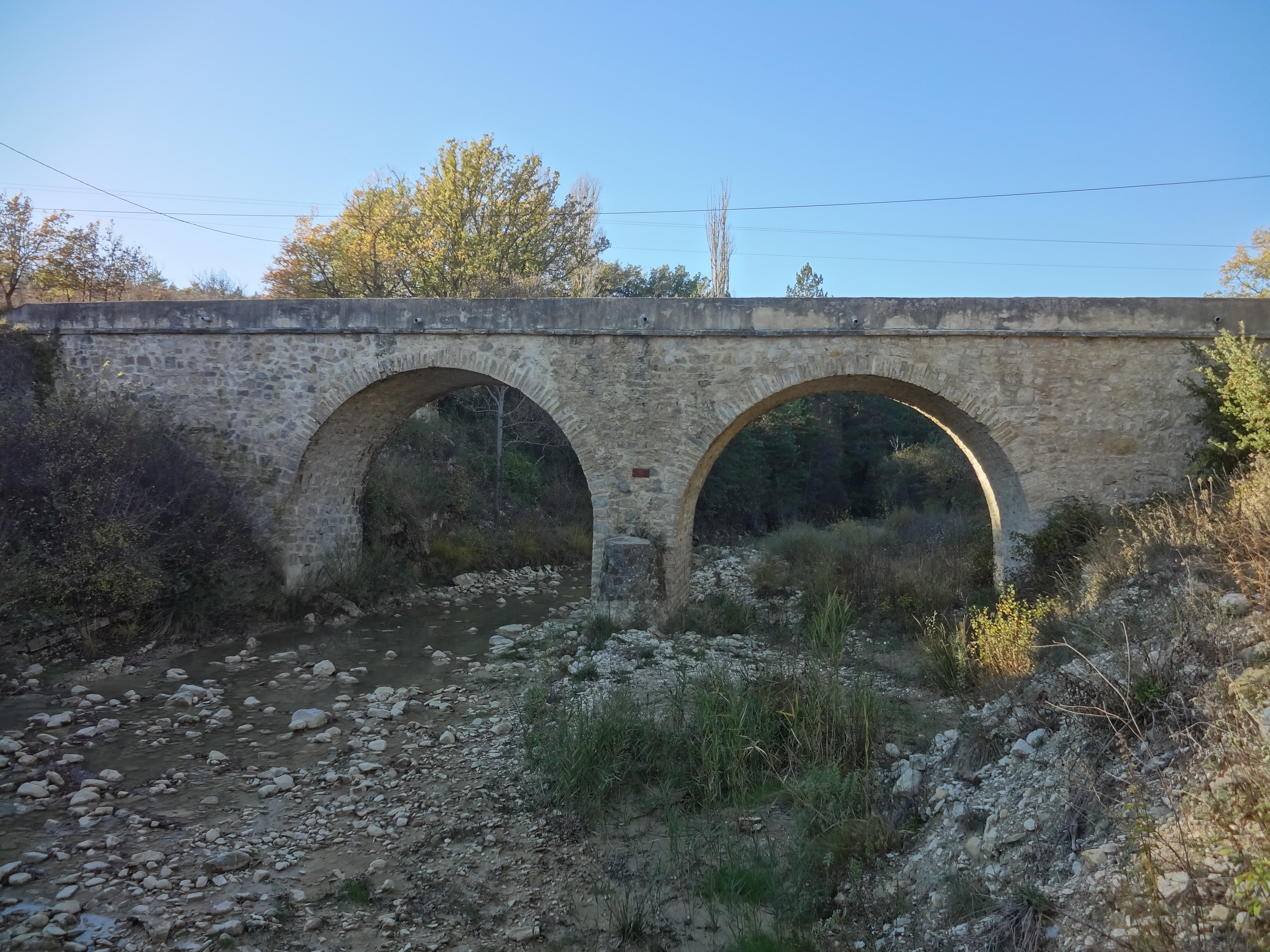 Pont de la RD 16 sur le Lauzon à Sigonce (altitude 479 m).